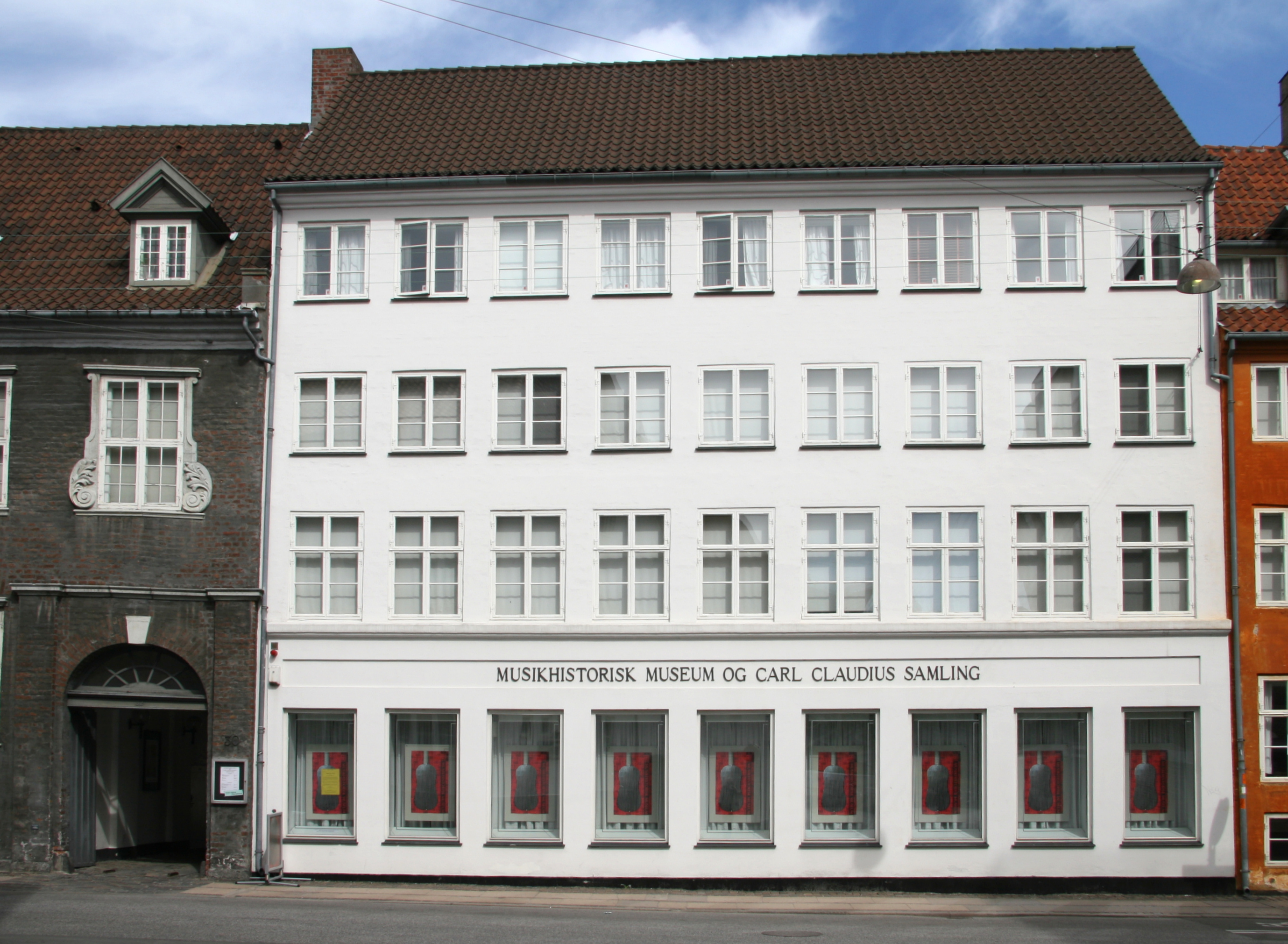 Musikmuseet (Music Museum) in Copenhagen